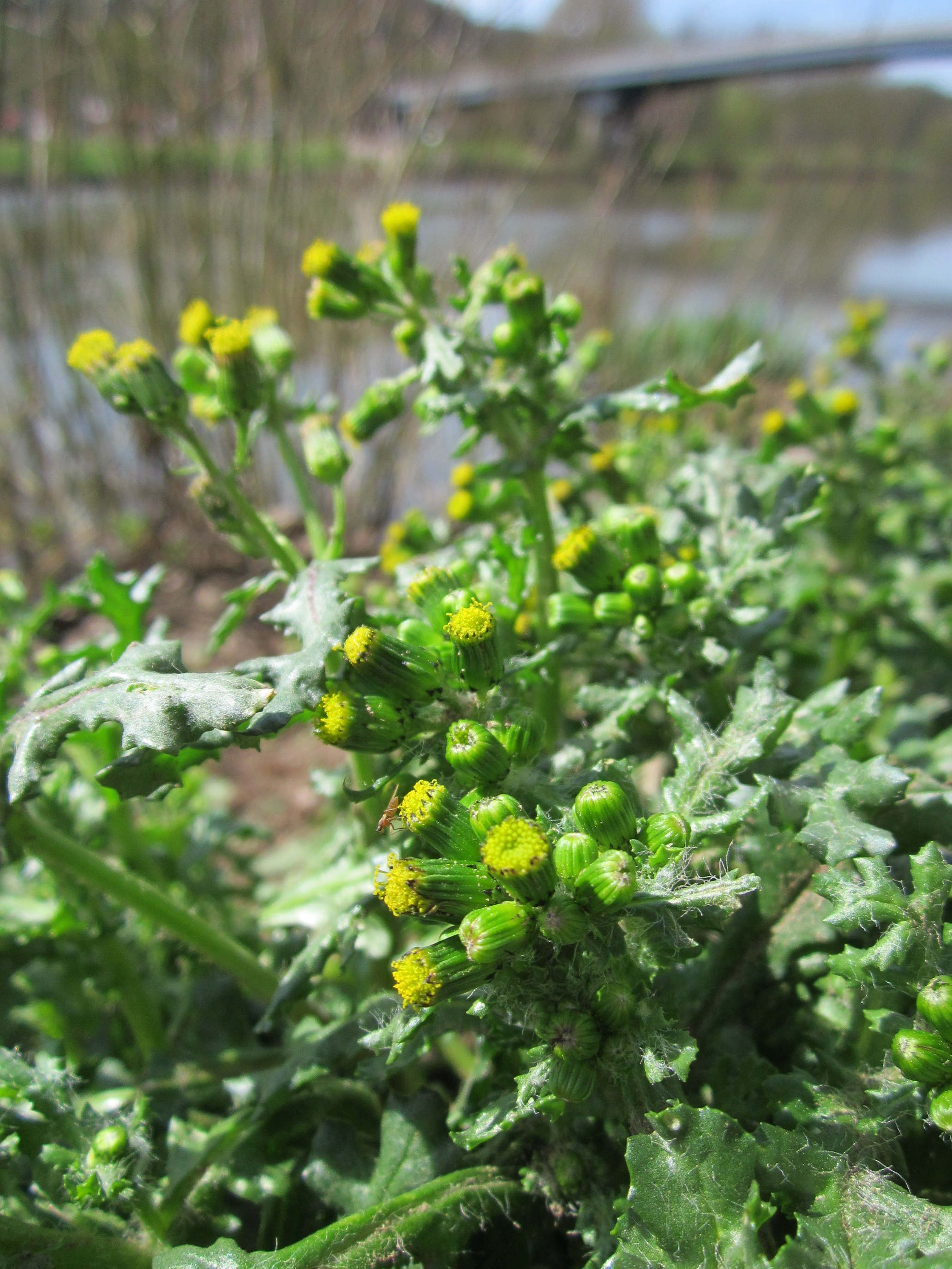 Gewöhnliches Greiskraut (Senecio vulgaris) an der Saar in Saarbrücken